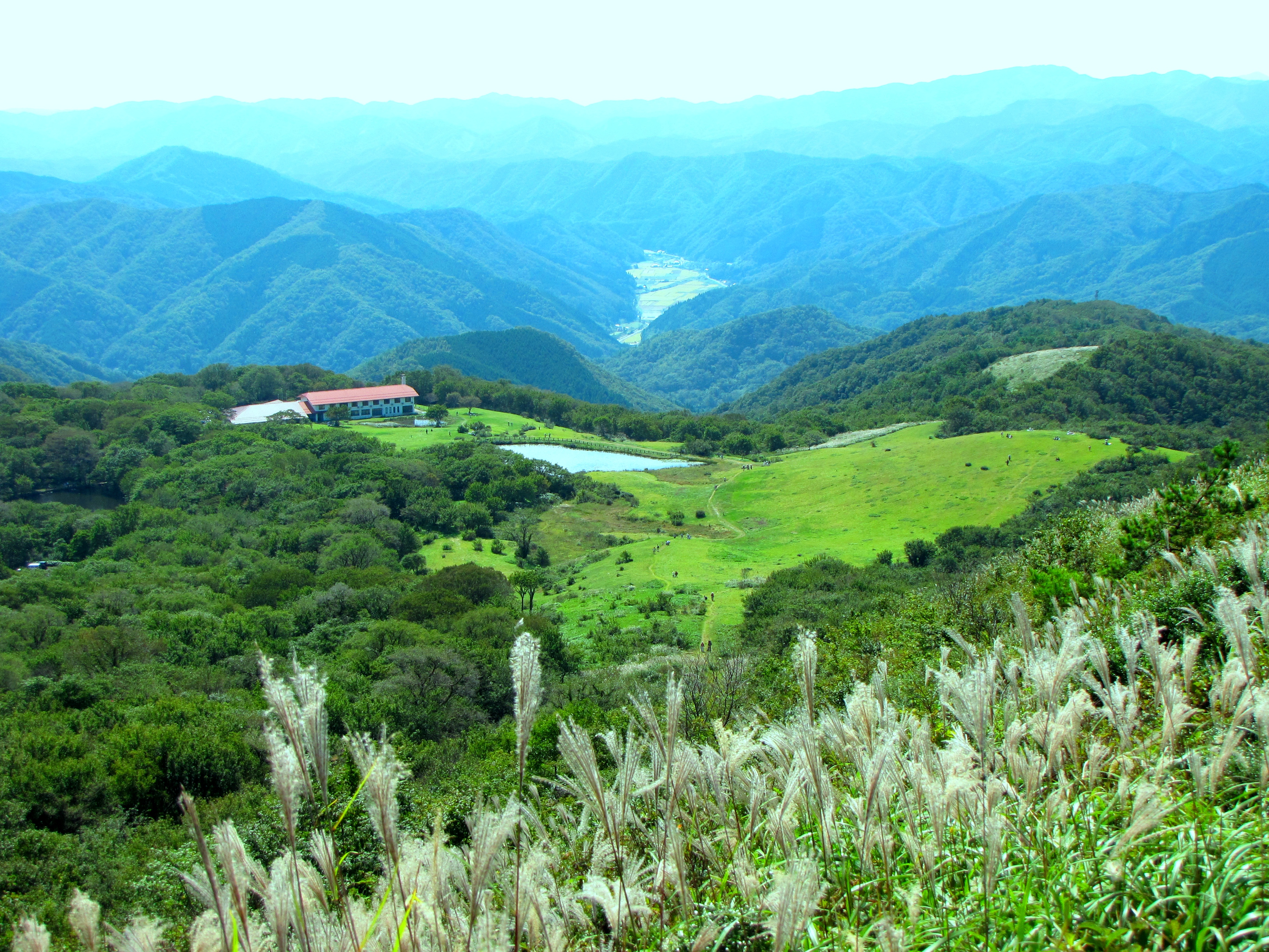 広島県庄原市の吾妻山ロッジの遠景。